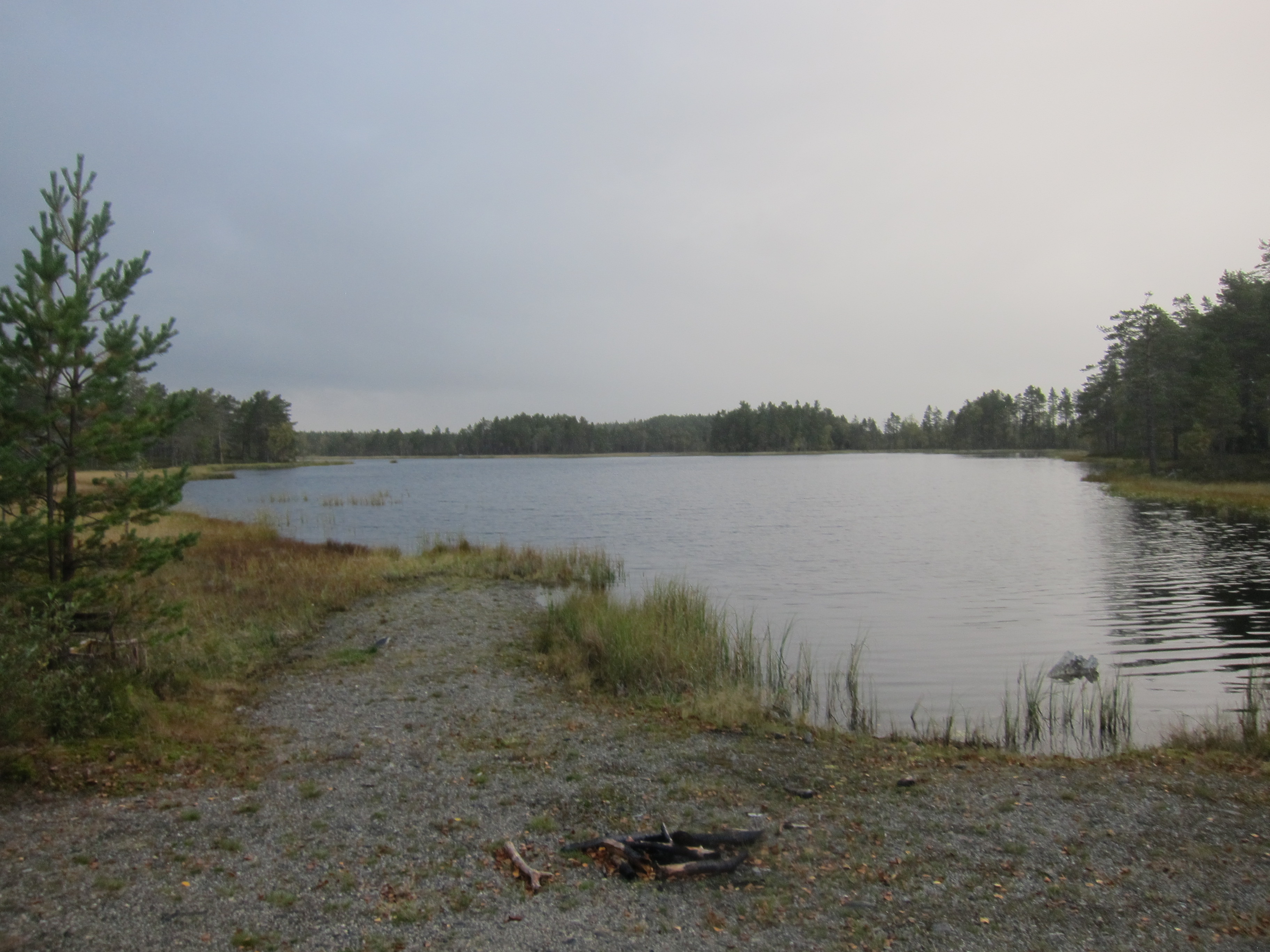 Brånsjön i Umeå kommun.